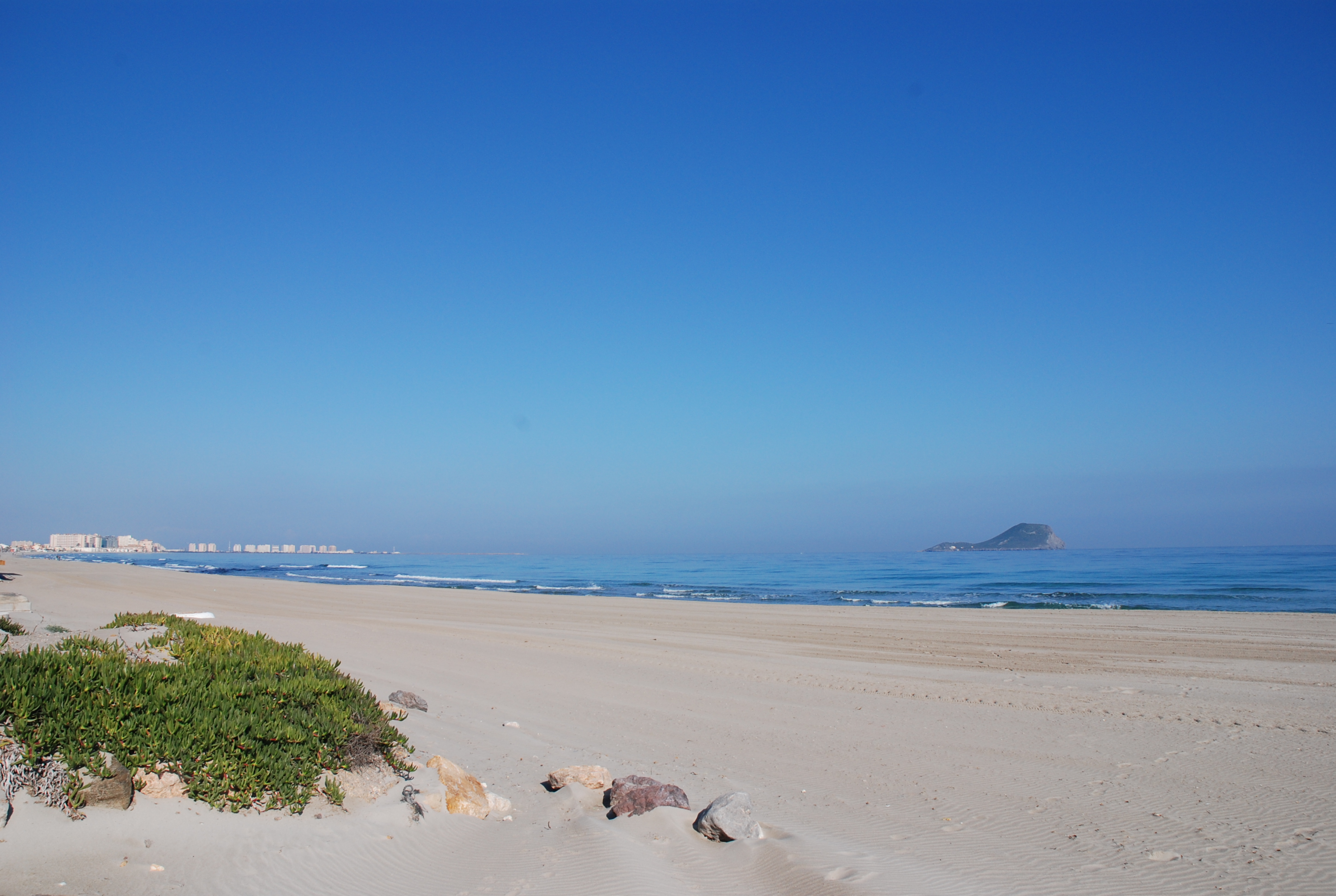 Beach at La Manga